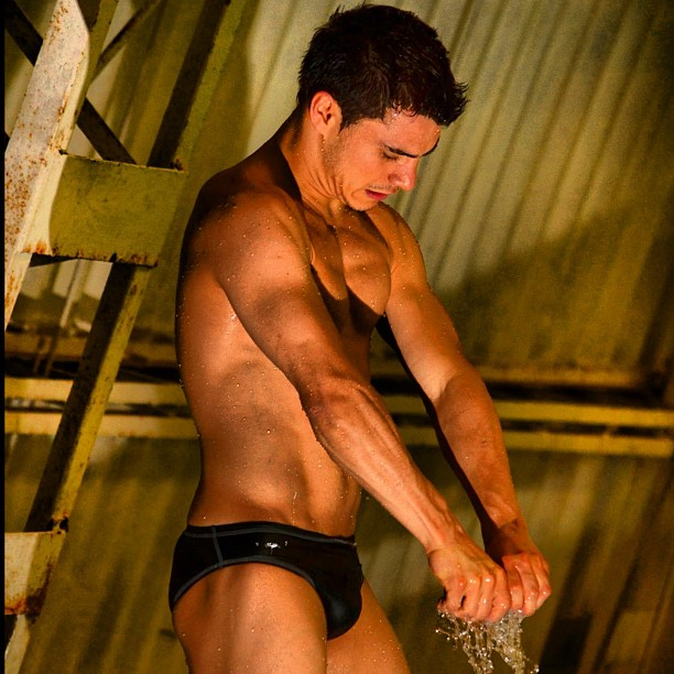 El clavadista mexicano